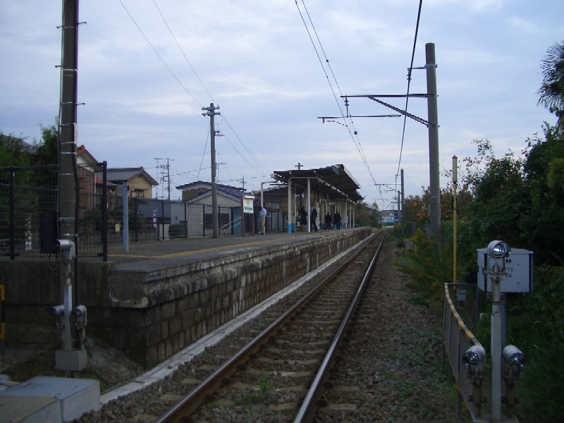 Miyayama Station on JR Sagami Line, Samukawa, Kanagawa 宮山駅